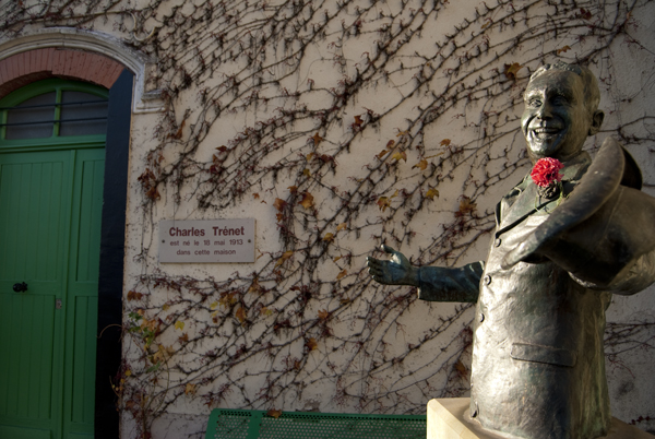 Casa natal en Narbona del cantante Charles Trenet